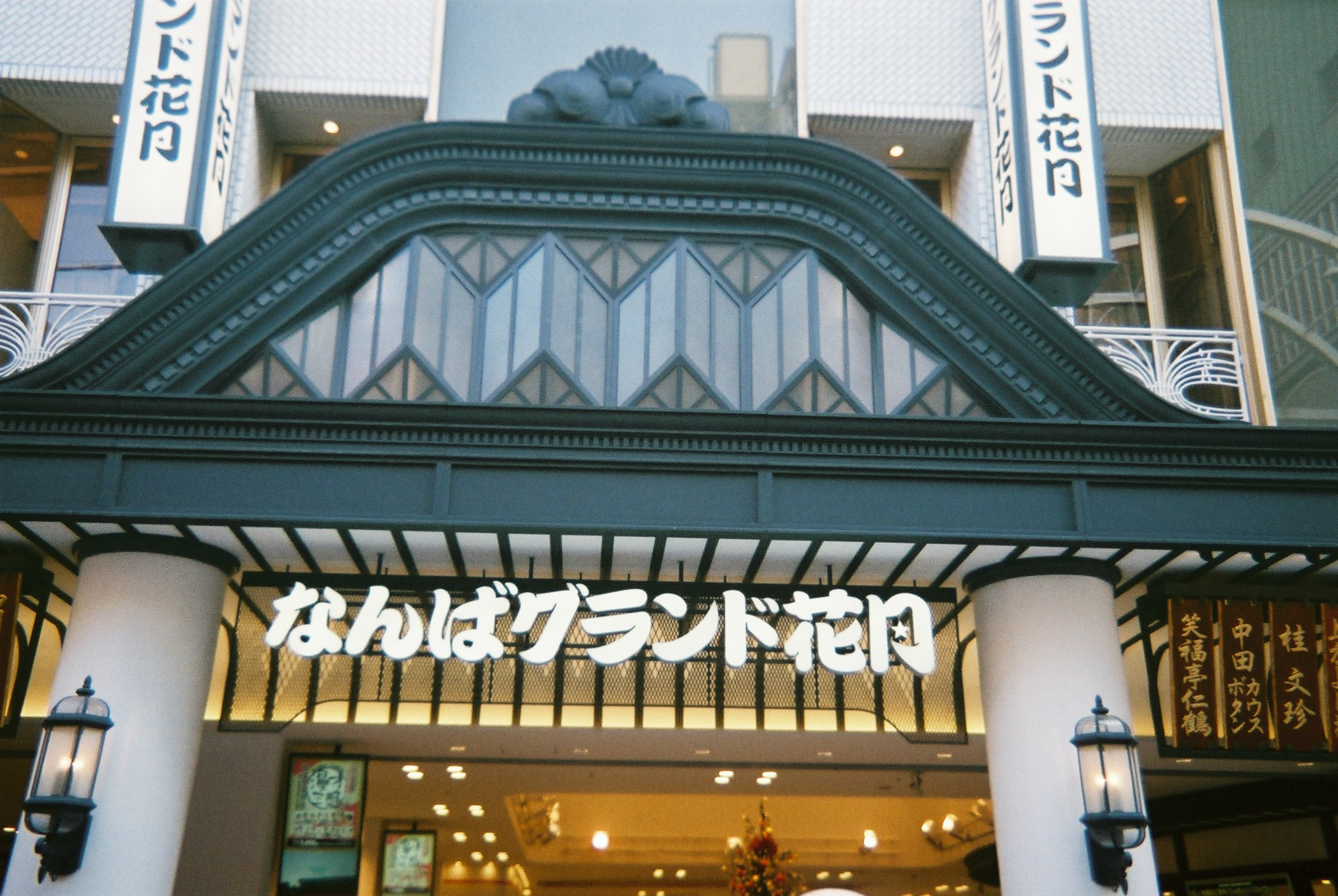 なんばグランド花月看板